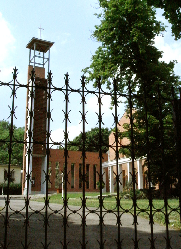 A budahegyvidéki evangélikus gyülekezet temploma, Budapest, Kék Golyó utca, 17. This is a photo of a monument in Hungary, Identifier: 1154